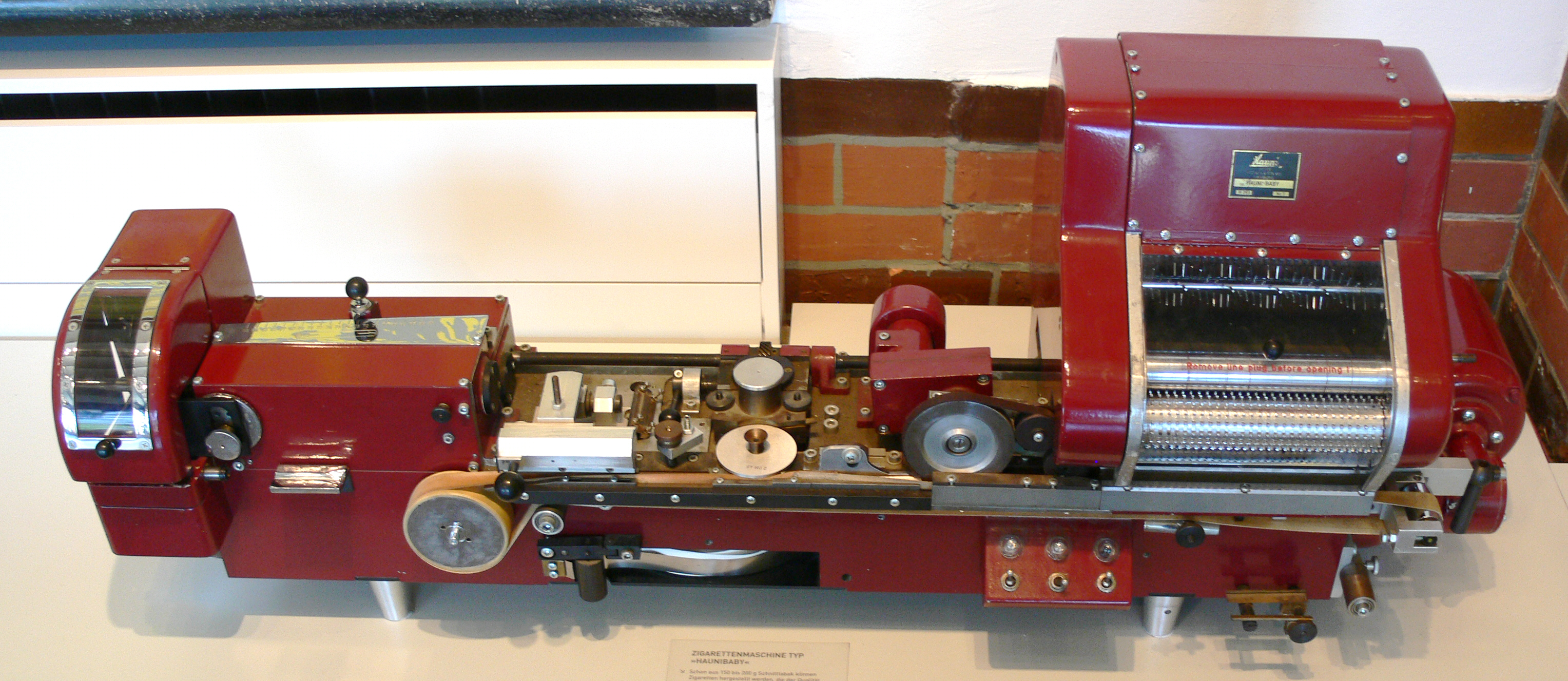 Hamburg, Deutsches Zollmuseum Zigarettenmaschine Typ „Haunibaby“ (Leistung bei Motorantrieb bis zu 60 Zigarettten/Minute), Hersteller: Hauni Maschinenbau, Hamburg DZM 1.013.187 – P011 – E03 (Stiftung der Körber AG, Hamburg-Bergedorf)